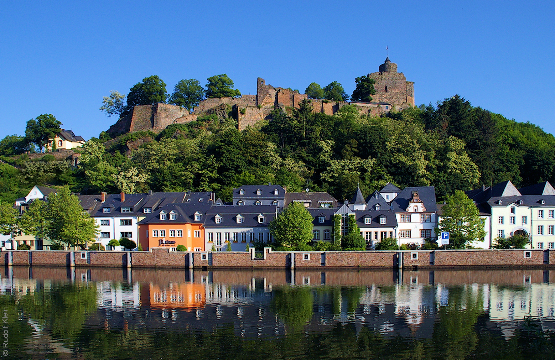 Burgpanorama mit Altstadt Saarburg